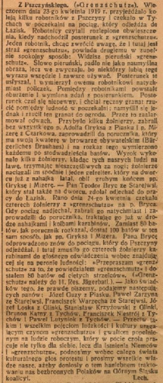 Stanisław Krzyżowski, ps. Lech, tekst o Grenzschutzu, Górnoślązak z 27 kwietnia 1919, nr 97, s. 6